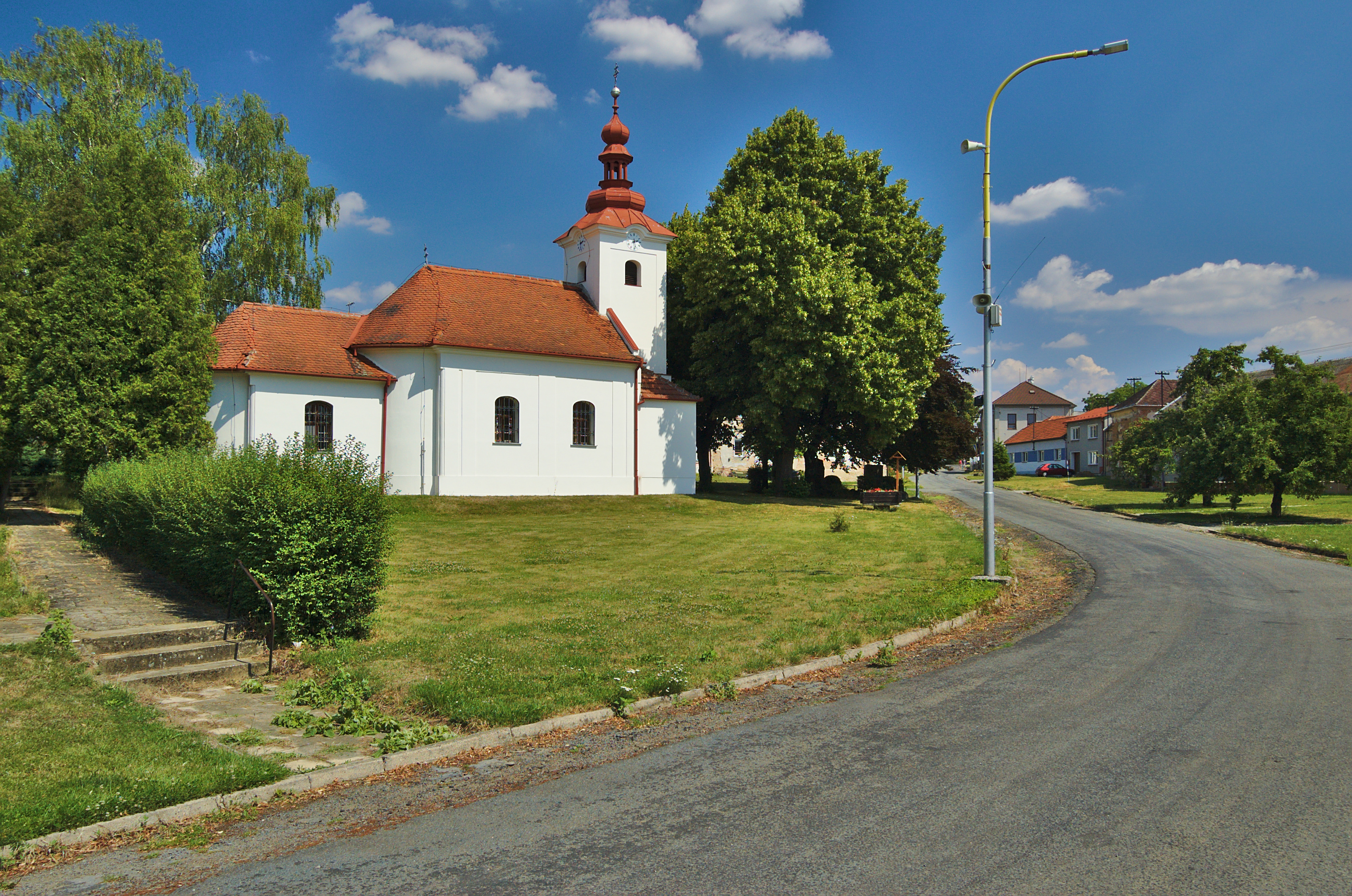 Kaple svaté Anny, Zdětín, okres Prostějov